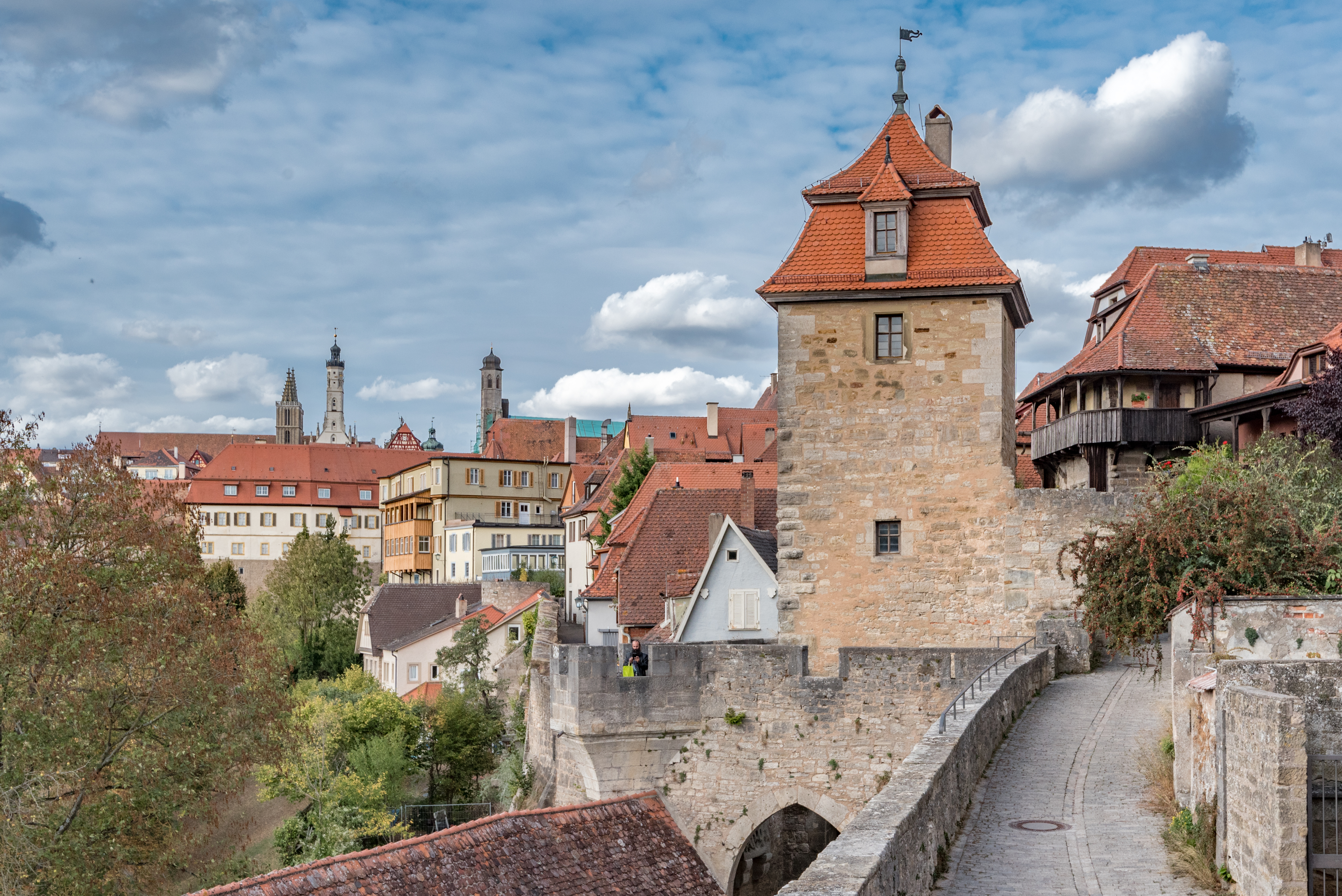 Rothenburg ob der Tauber, Kobolzeller Tor